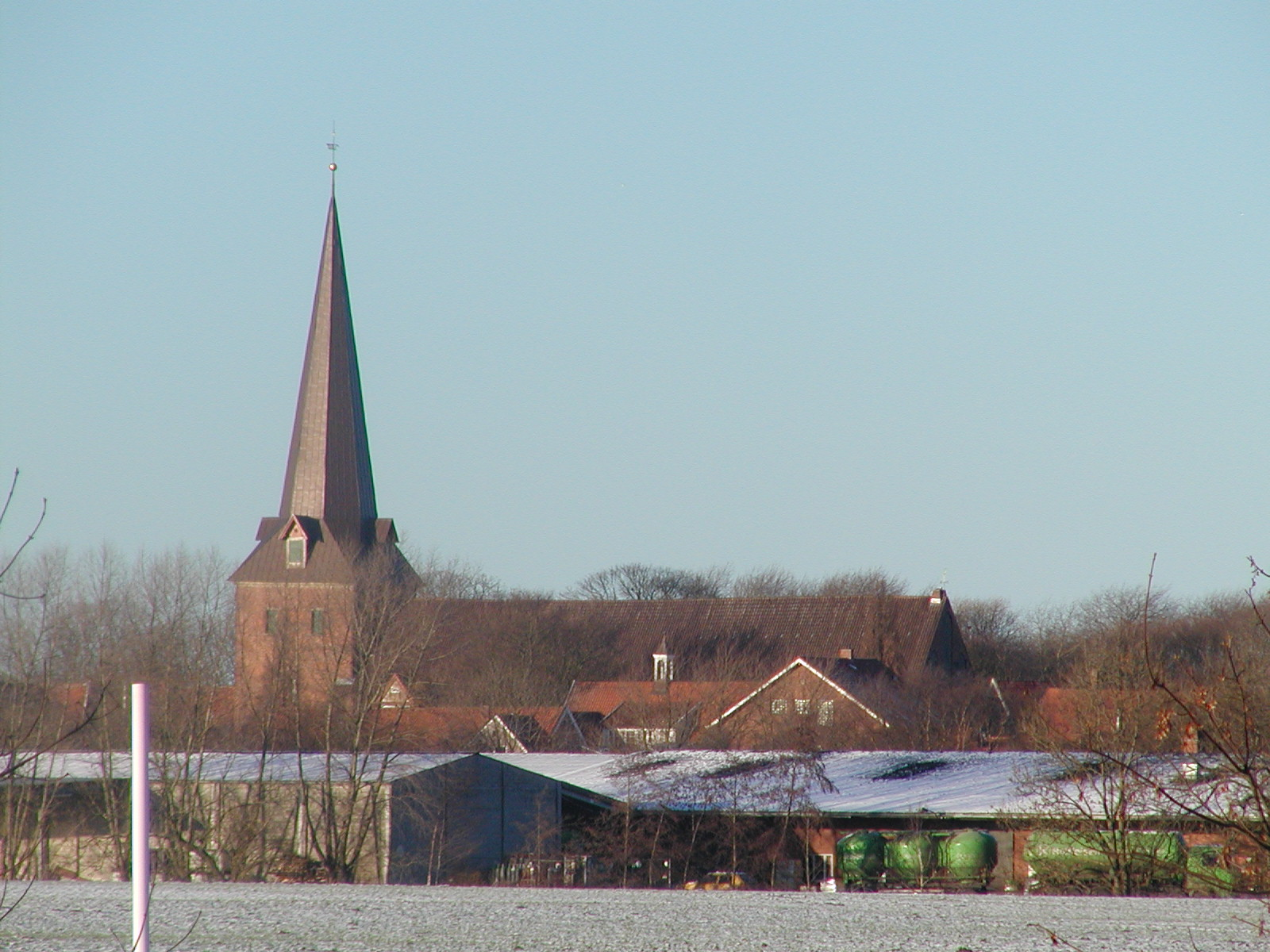 Der Otterndorfer "Bauerndom" Von weiten ist die Größe der Kirche zu erkennen